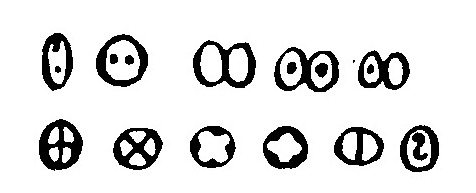 Очные и окрестные "О" Евфимий Федорович Карский. Славянская кирилловская палеография. Изд.-во Академии наук СССР, Л., 1928 стр. 196